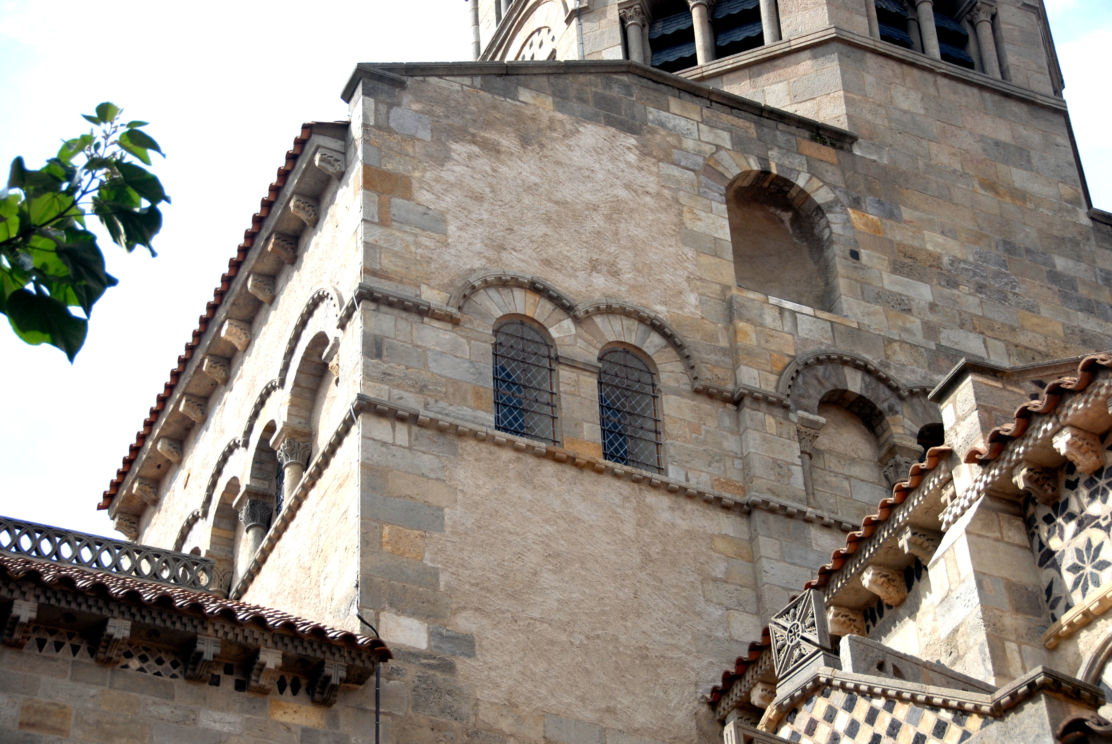 Notre-Dame du Port, massiv barlong